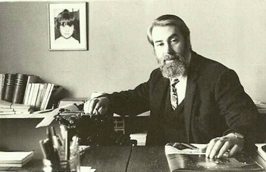 El escritor Juan Carlos Nigro en su casa en la década de los '70. Foto provista por su hija Marcela Nigro.